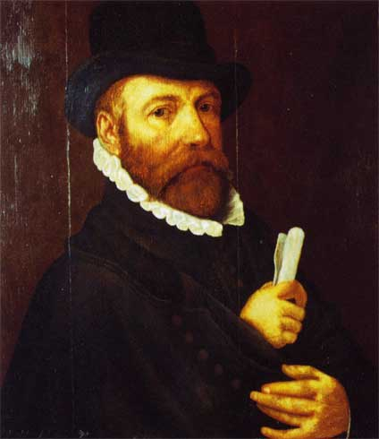 Portret van Wouter Crabeth. Portret van Wouter Crabeth uit de St. Janskerk te Gouda. N.b. in "Duizend Jaar Gouda" zijn bij de onderschriften de namen "Wouter" en "Dirk" verwisseld! Zie: (Groene Hart Archieven) hier voor de goede informatie streekarchief.